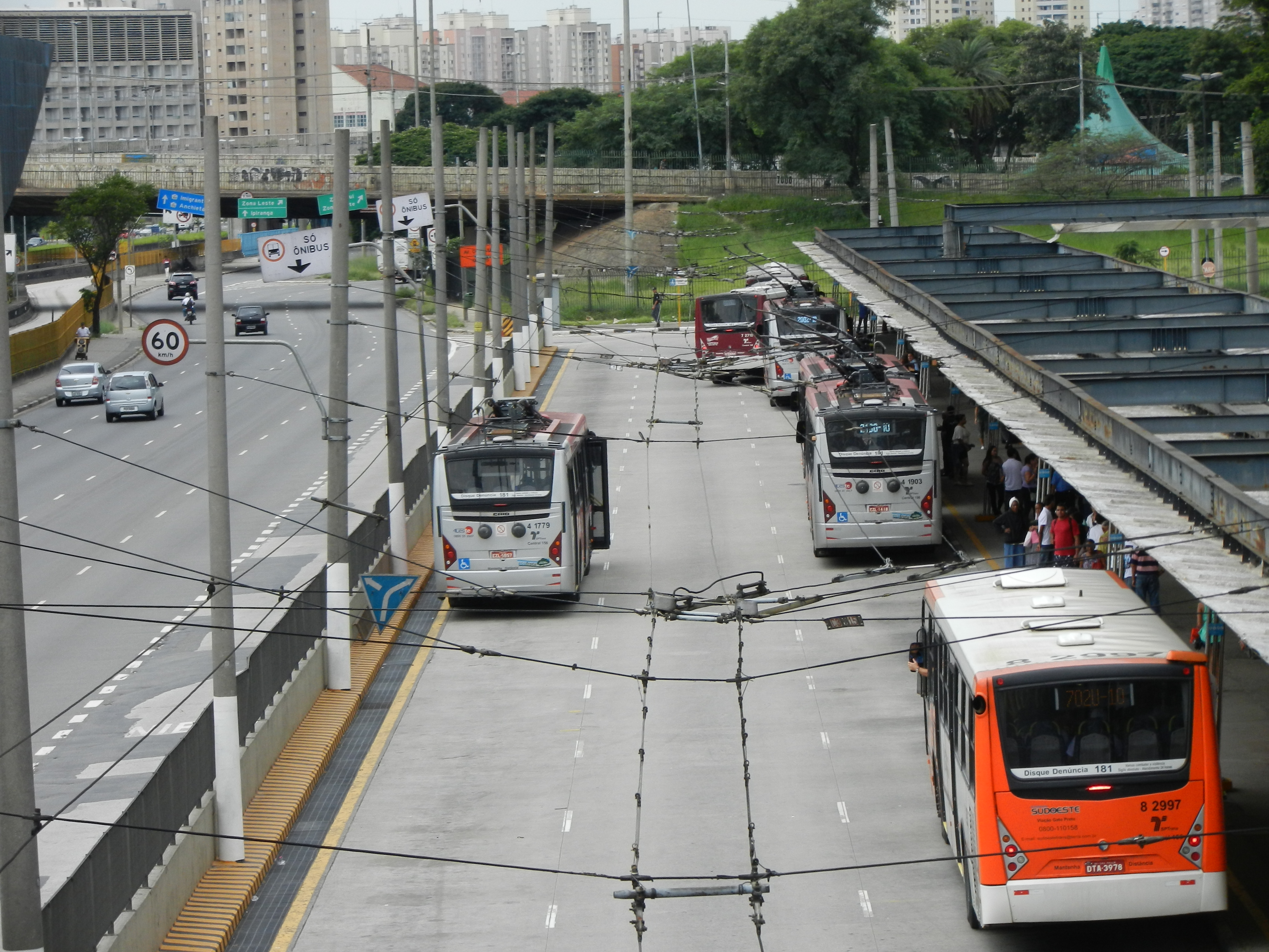 Trólebus no Terminal D. Pedro II